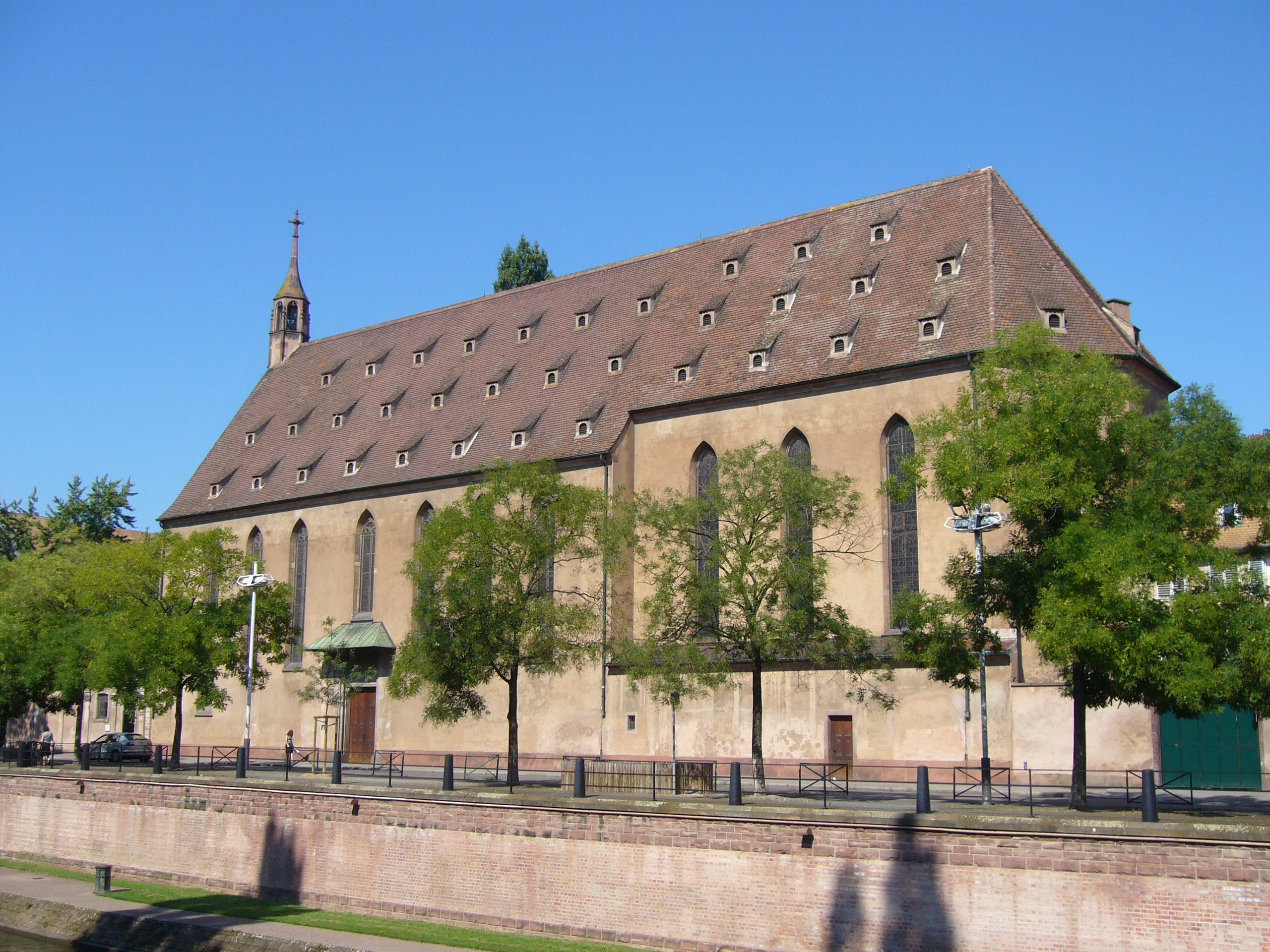 Eglise Saint Jean-Baptiste